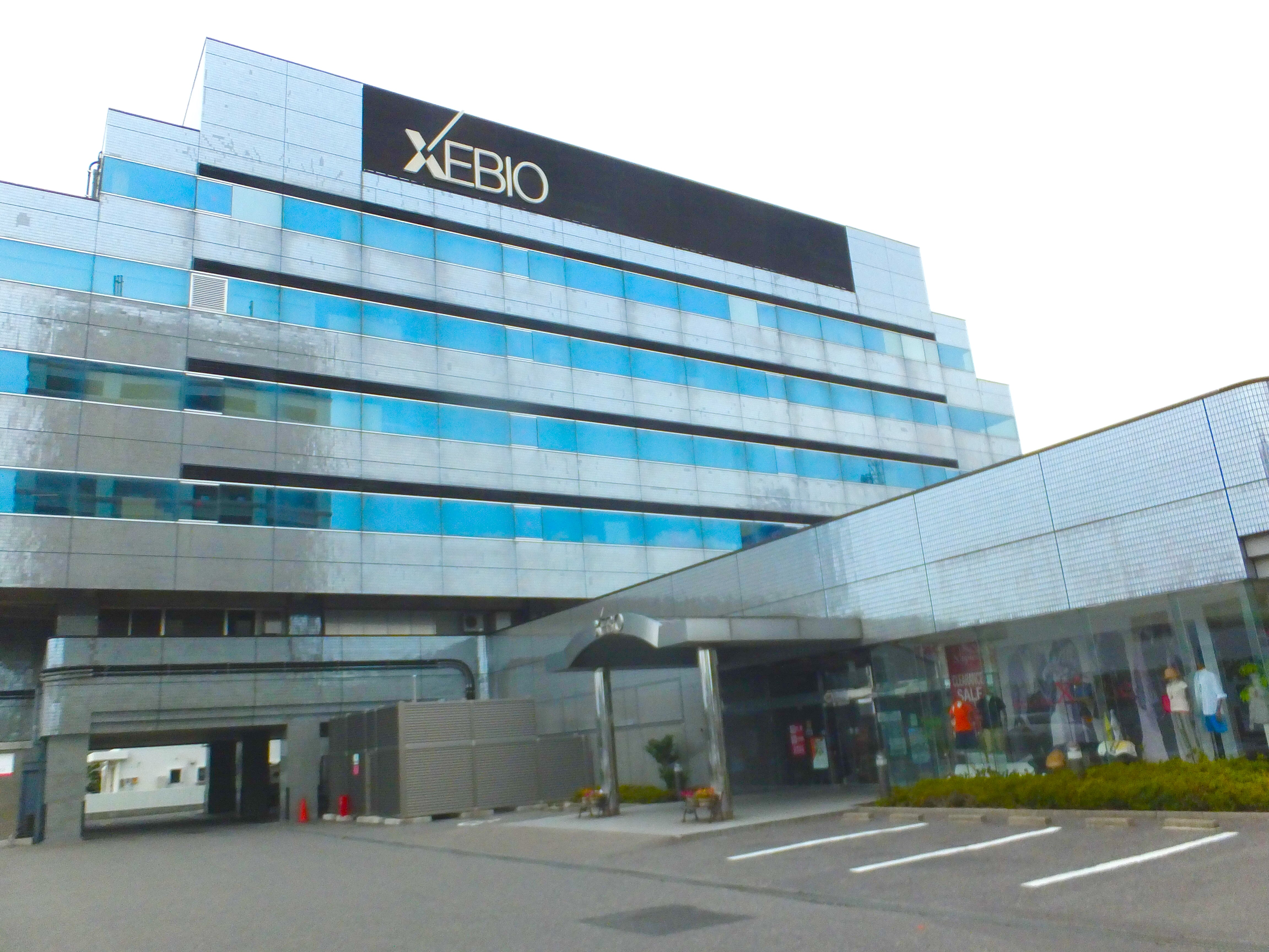 ゼビオホールディングス本社